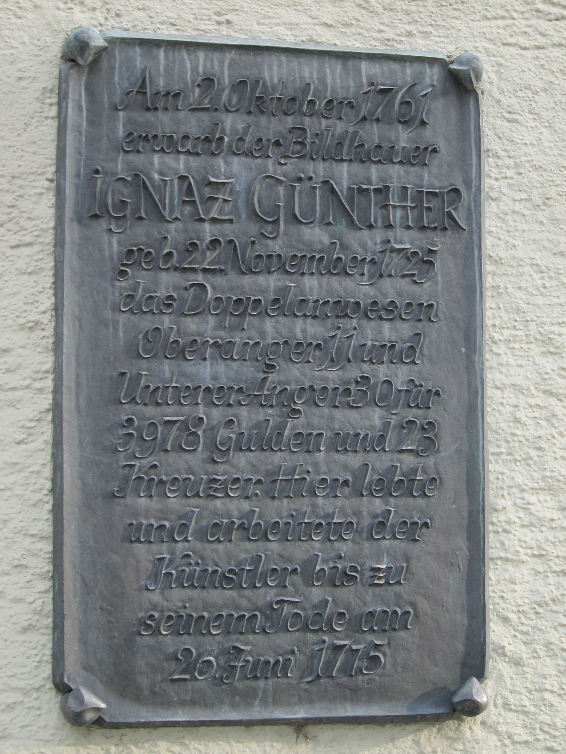 Oberanger 11; Erinnerungstafel am sog. Ignaz-Günther-Haus